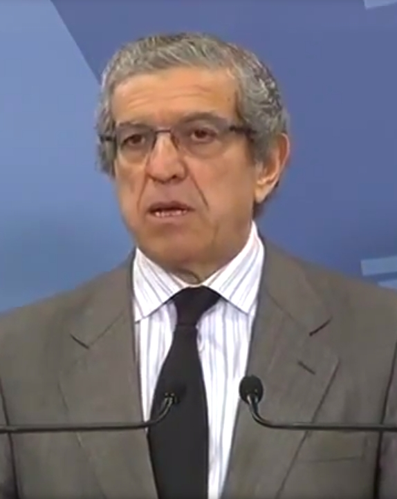 La reunión mantenida entre el presidente de la Junta de Castilla y León, Juan Vicente Herrera y los presidentes de Unicaja, Braulio Medel, y Caja España-Duero, Evaristo del Canto, ha dado como resultado el compromiso de ambas las entidades con los intereses del territorio de Castilla y León.